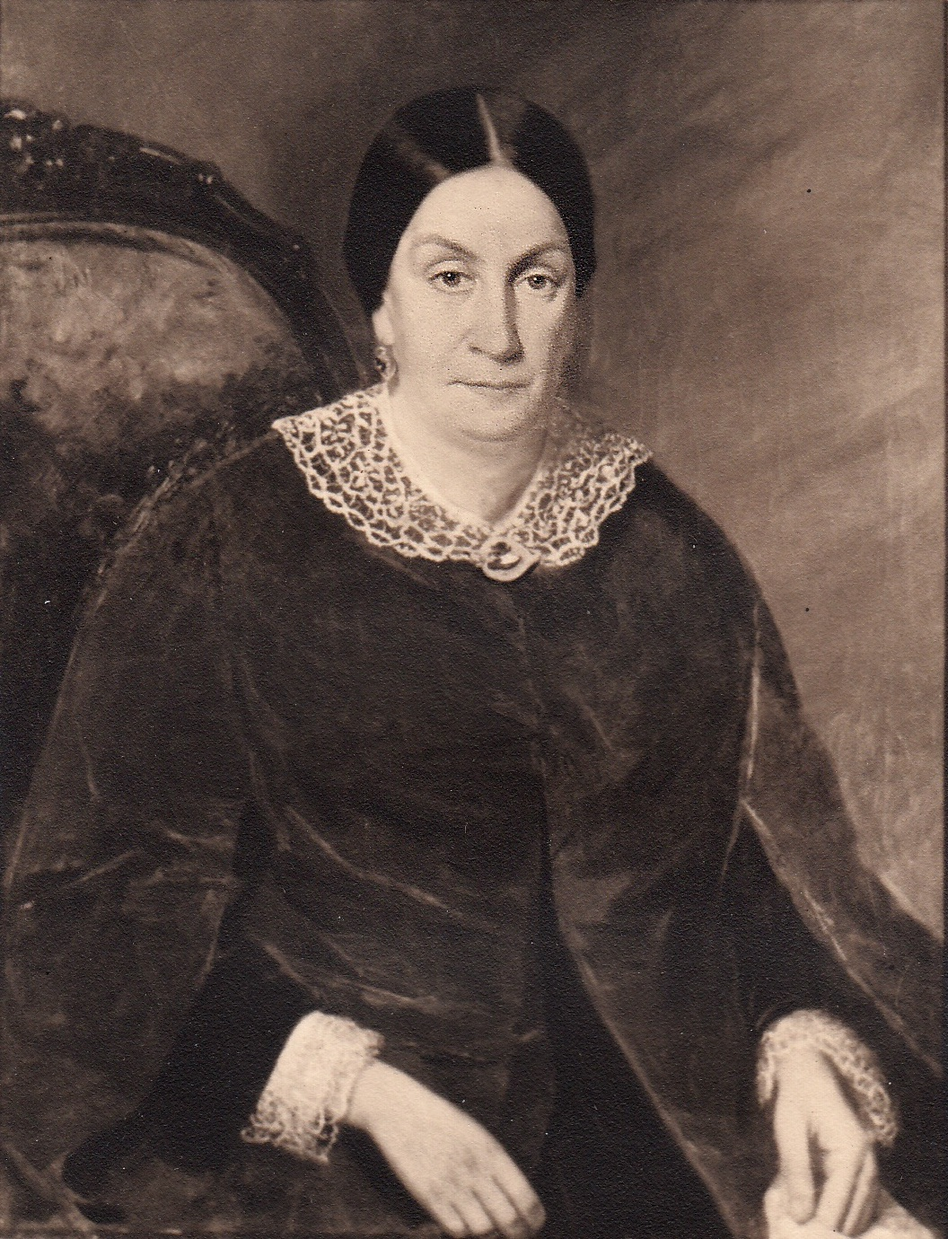 Mercedes Lois Vergara esposa y prima de Pedro Nolasco Vergara Albano retrato de Raymond Monvoisin del año 1859 en Santiago de Chile.